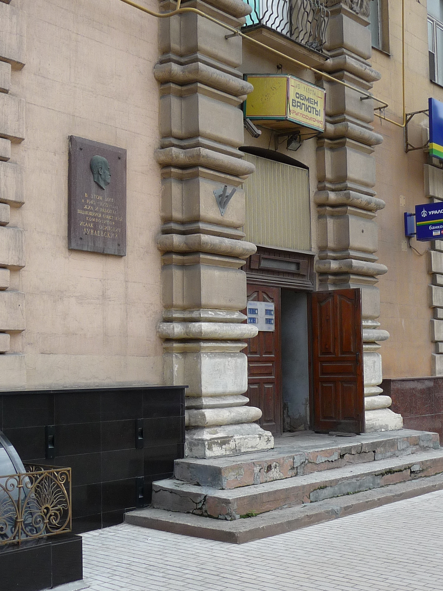 Monument-p1030309.jpg